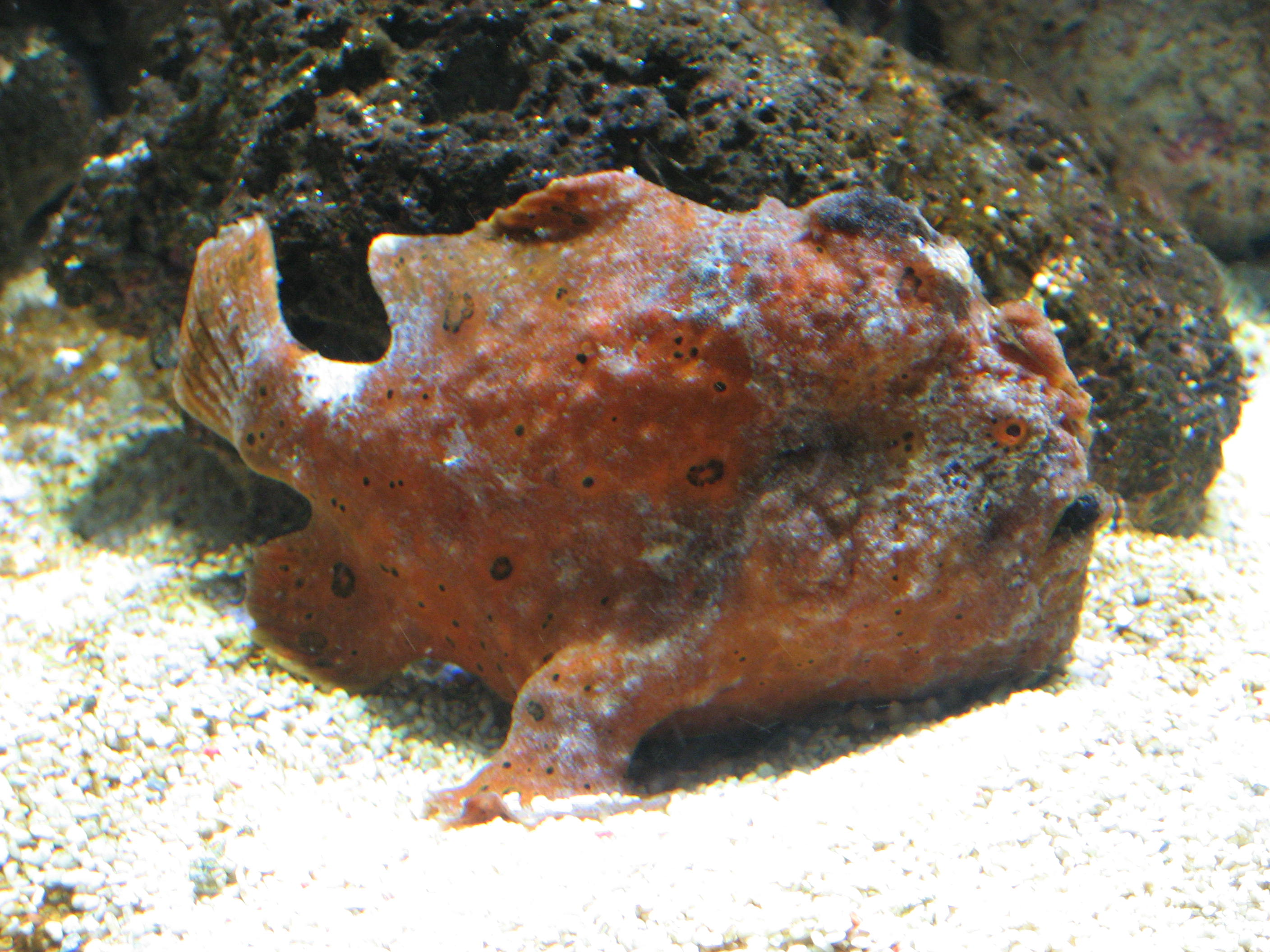 Antennarius commersonii in Muséum-aquarium de Nancy Map: 48° 41' 41" N 6° 11' 18" E